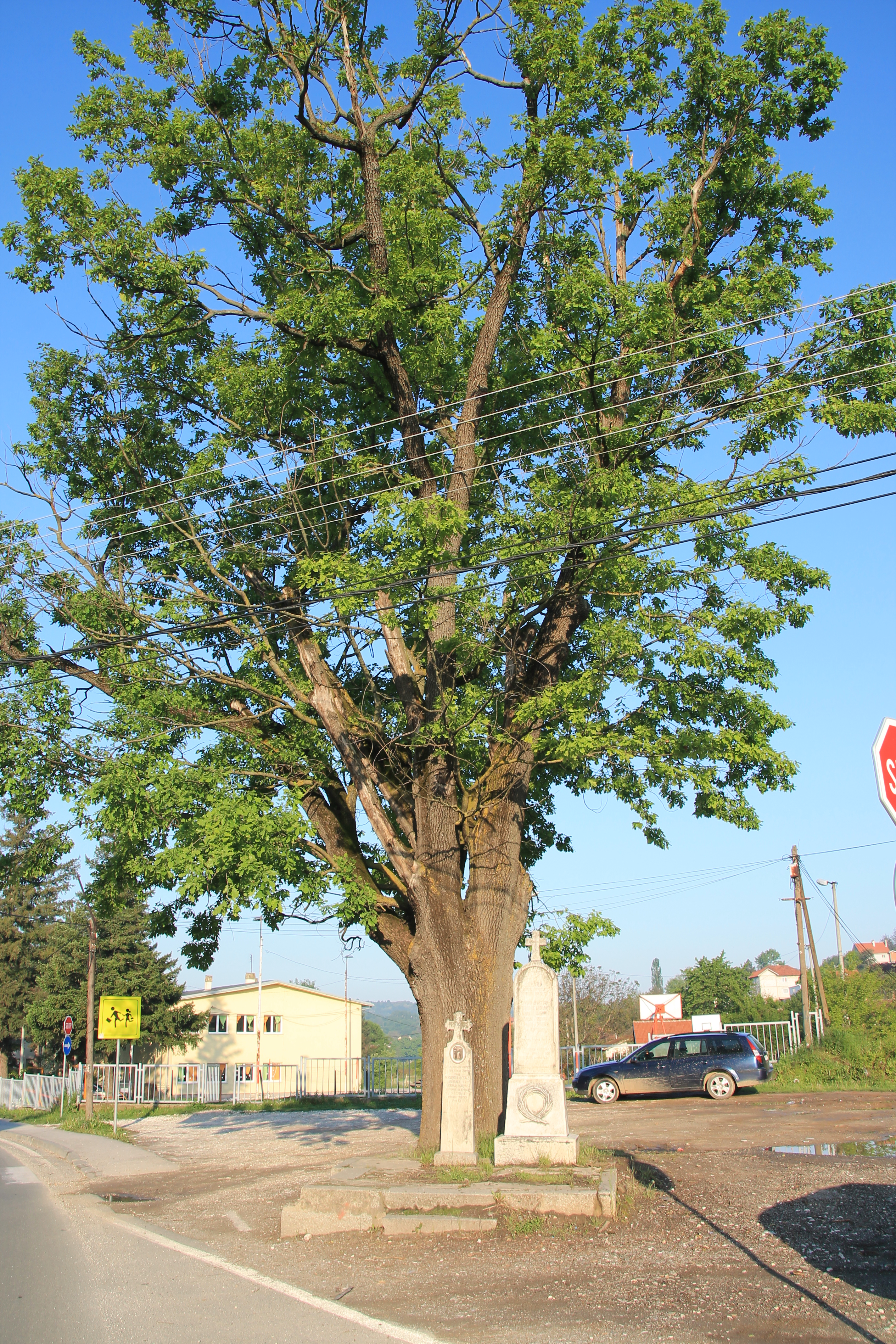 Raskršće u Darosavi